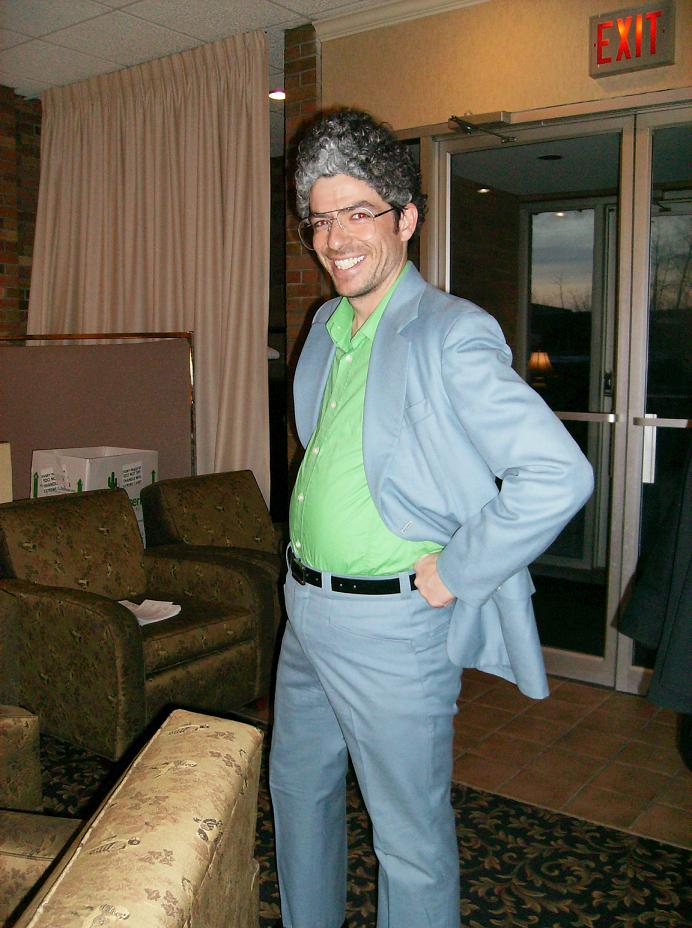 Mathieu Pichette dans le rôle de Pierre-Paul Paquet. Photo prise à Sudbury, Ontario.